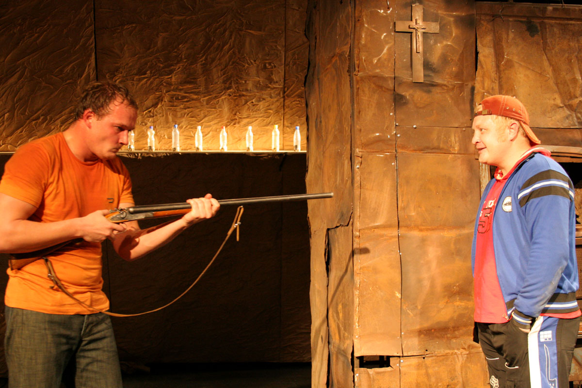 Сцена из спектакля Саратовского академического театра драмы «Сиротливый запад». Александр Кузьмин (Вэлин Коннор) и Андрей Казаков (Коулмэн Коннор)